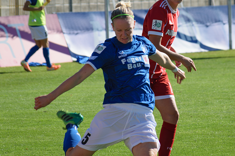 Diane Caldwell